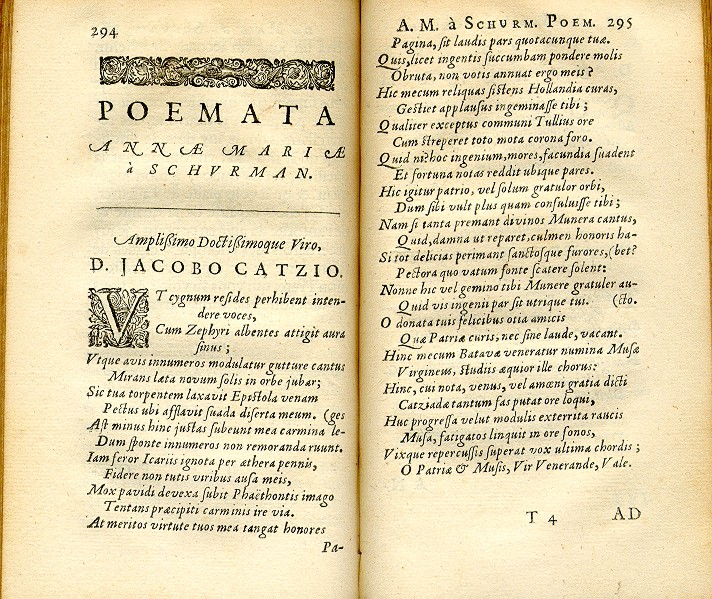 Doppelseite aus "Opuscula Hebraea, Graeca, Latina, Gallica, Prosaica et Metrica" von Anna Maria Schürmann. Gedichte. p. 294-295. Text: POEMATA ANNAE MARIAE à SCHURMAN. Amplissimo Doctissimoque Viro, D. JACOBO CATZIO. Ut cygnum resides perhibent intendere voces, Cum Zephyri albentes attigit aura sinus; Utque avis innumeros modulare gutture cantus Mirans laeta novum solis in orbe jubar; Sic tua torpentem laxavit Epistola venam Pectus ubi afflavit suada diserta meum. .... Tanslation